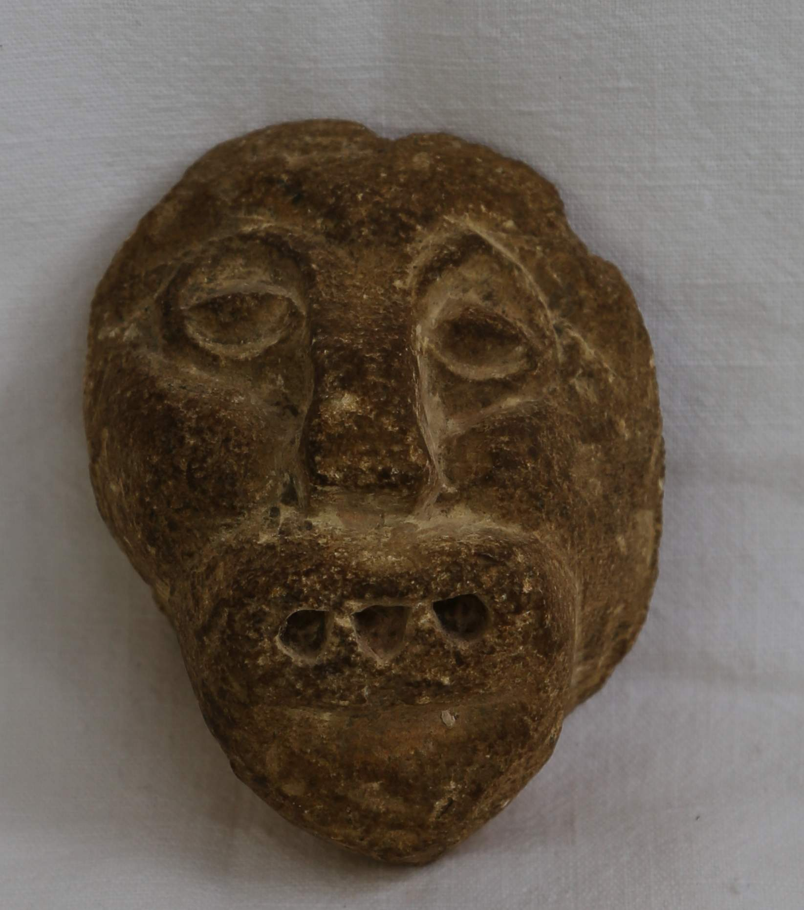 grotesque en grès de 8 cm de haut qui a été détaché d'un élément plus vaste.